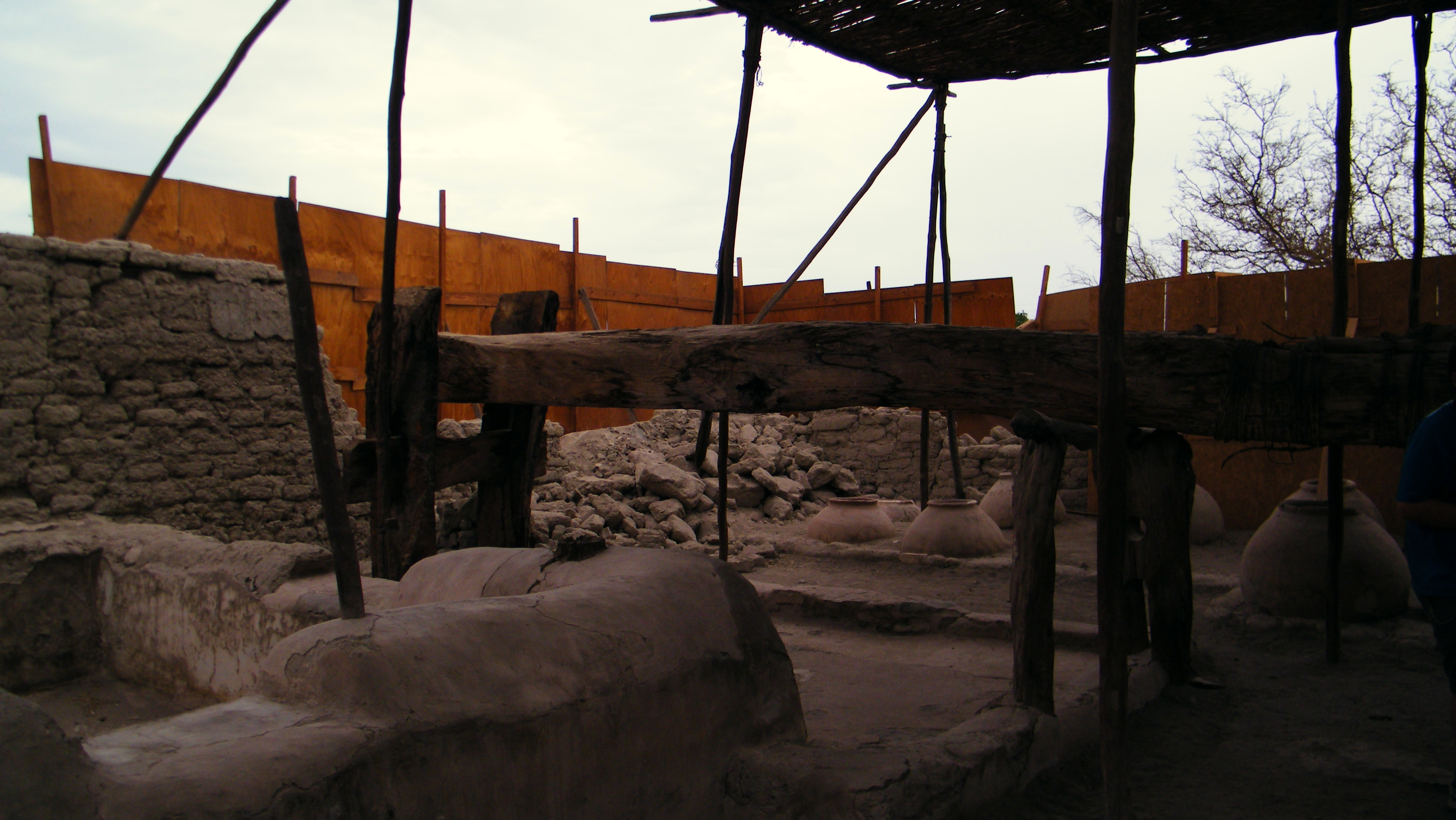 Lagar de Matilla This is a photo of a national monument in Chile: 1103